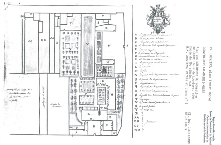 Plan du couvent de Louviers 1696 - copie du XIXe siècle, s.d. - B.M. Louviers, cartes et plans n°19